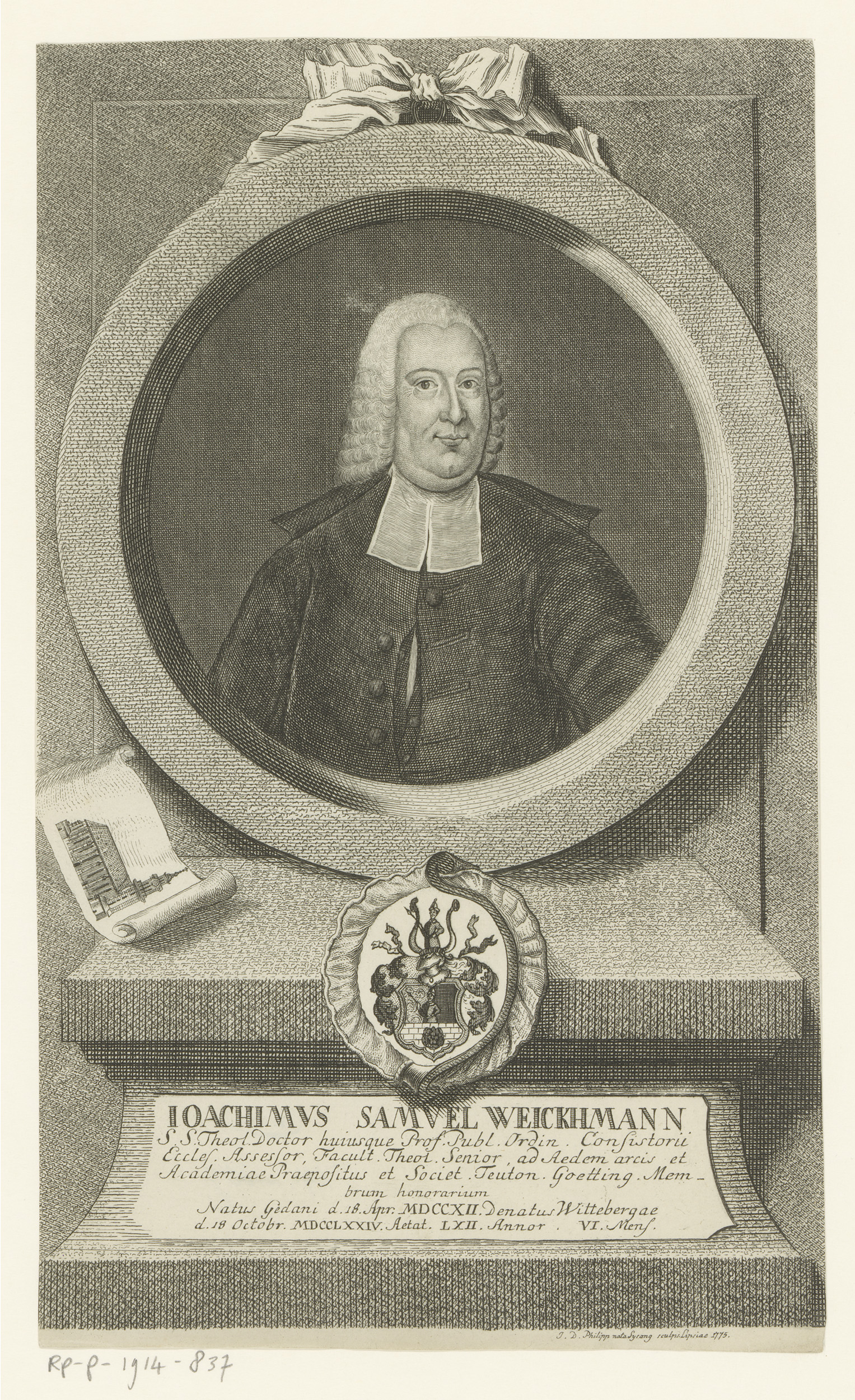 IdentificatieTitel(s): Portret van Joachim Samuel WeickhmannObjecttype: prent Objectnummer: RP-P-1914-837Catalogusreferentie: HAB A 23462Opschriften / Merken: verzamelaarsmerk, verso, gestempeld: Lugt 2228VervaardigingVervaardiger: prentmaker: Johanna Dorothea Sysang (vermeld op object)Plaats vervaardiging: LeipzigDatering: 1775Fysieke kenmerken: gravureMateriaal: papier Techniek: graveren (drukprocedé)Afmetingen: blad: h 312 mm (binnen de plaatrand afgesneden) × b 186 mm (binnen de plaatrand afgesneden)OnderwerpWat: historical personsarmorial bearing, heraldrychurch (exterior)Wie: Joachim Samuel WeickhmannVerwerving en rechtenVerwerving: aankoop 1905Copyright: Publiek domein